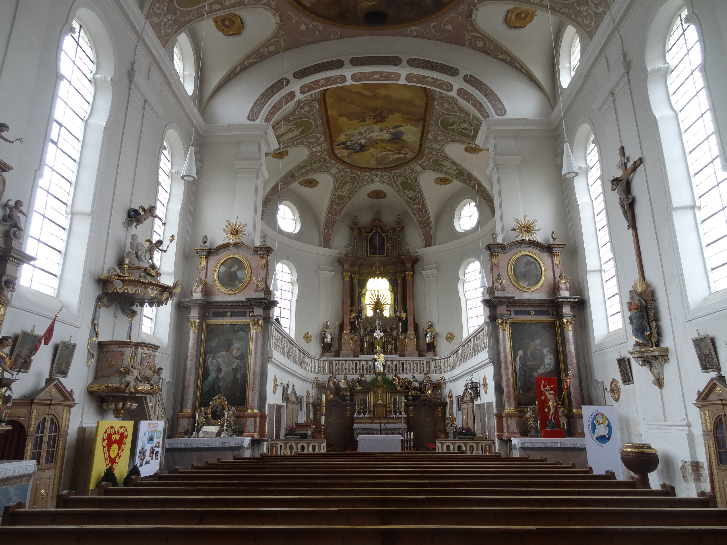 Innenraum der Pfarrkirche St. Nikolaus in Altfraunhofen (Lkr. Landshut)